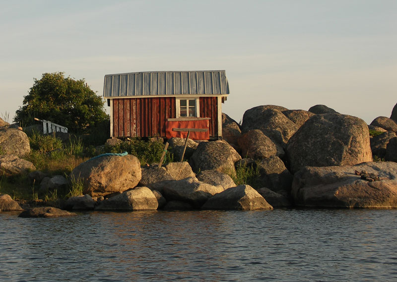 Kaikille avoin kalasauna Bullerbådanin saarella